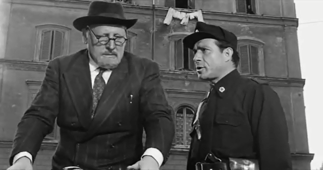 Il federale